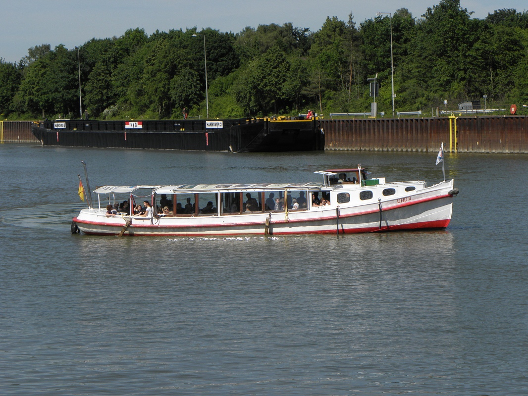 Barkasse Uhu II auf dem Elbe-Seitenkanal beim Schiffshebewerk Scharnebeck bei Lüneburg